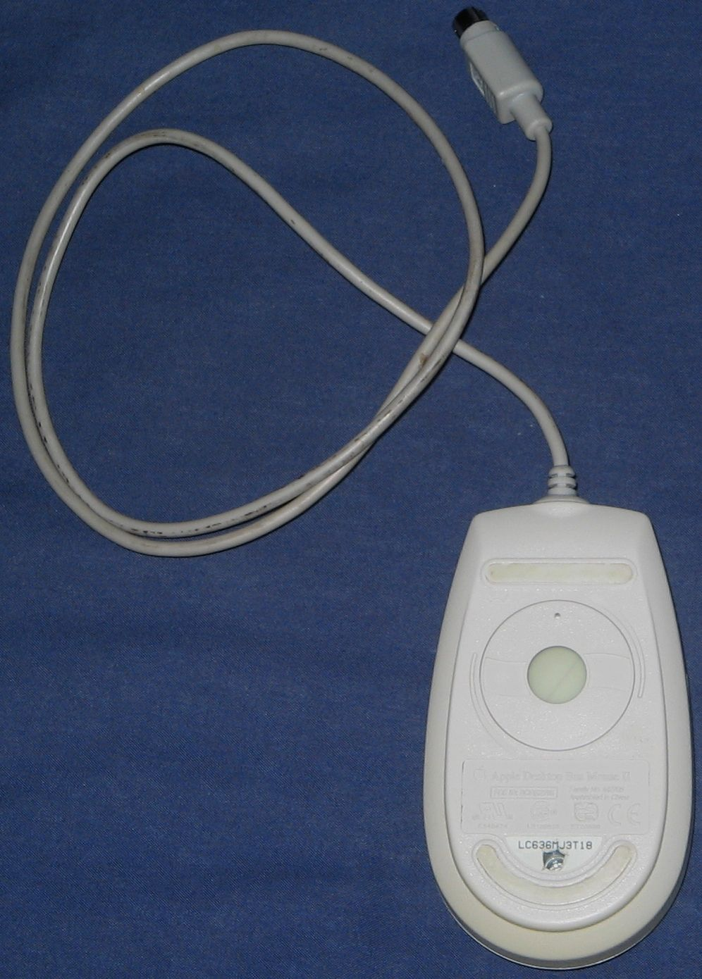 Bottom view of an Apple Desktop Bus Mouse II.